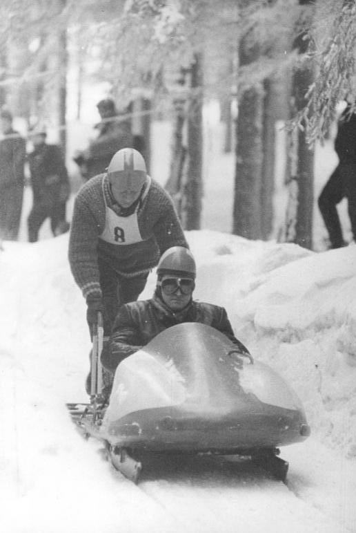 Ludwig, Baumbach Zentralbild Schmidt 28.1.1963 Deutsche Bob-Meisterschaften ausgetragen Auf der Bobahn am Spießberg bei Friedrichroda-Thüringen wurden am 27.1.1963 die Deutschen Meister im Zweierbob ermittelt. UBz: Ludwig-Baumbach (SG Motor Waltershausen) kurz vor dem Start zur großen Fahrt.